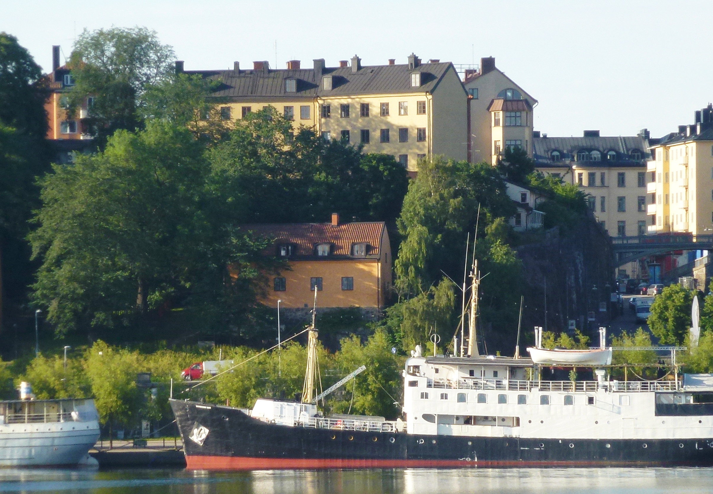 Västra Mariaberget med f.d. Öbergska klädesfabriken (kopparslagarhuset), på höjden olvanför syns arbetarhuset Skinnarviken 1